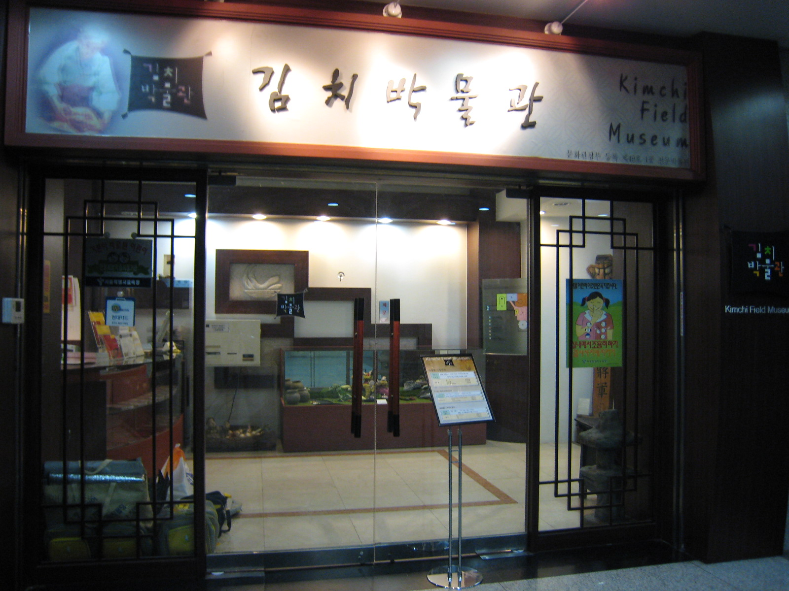 Korea-Seoul-Kimchi Field Museum